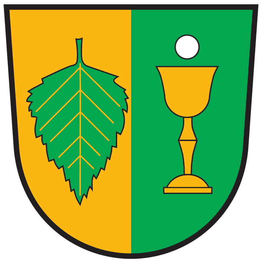 Wappen von Fresach